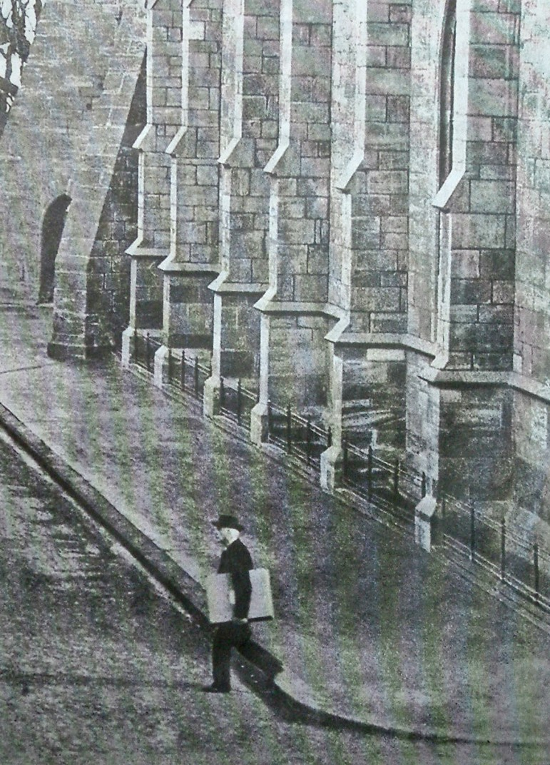 Jacob Burckhardt am Basler Münster, Jacob Burckhardt, 1878, mit Bildmappe am Basler Münster